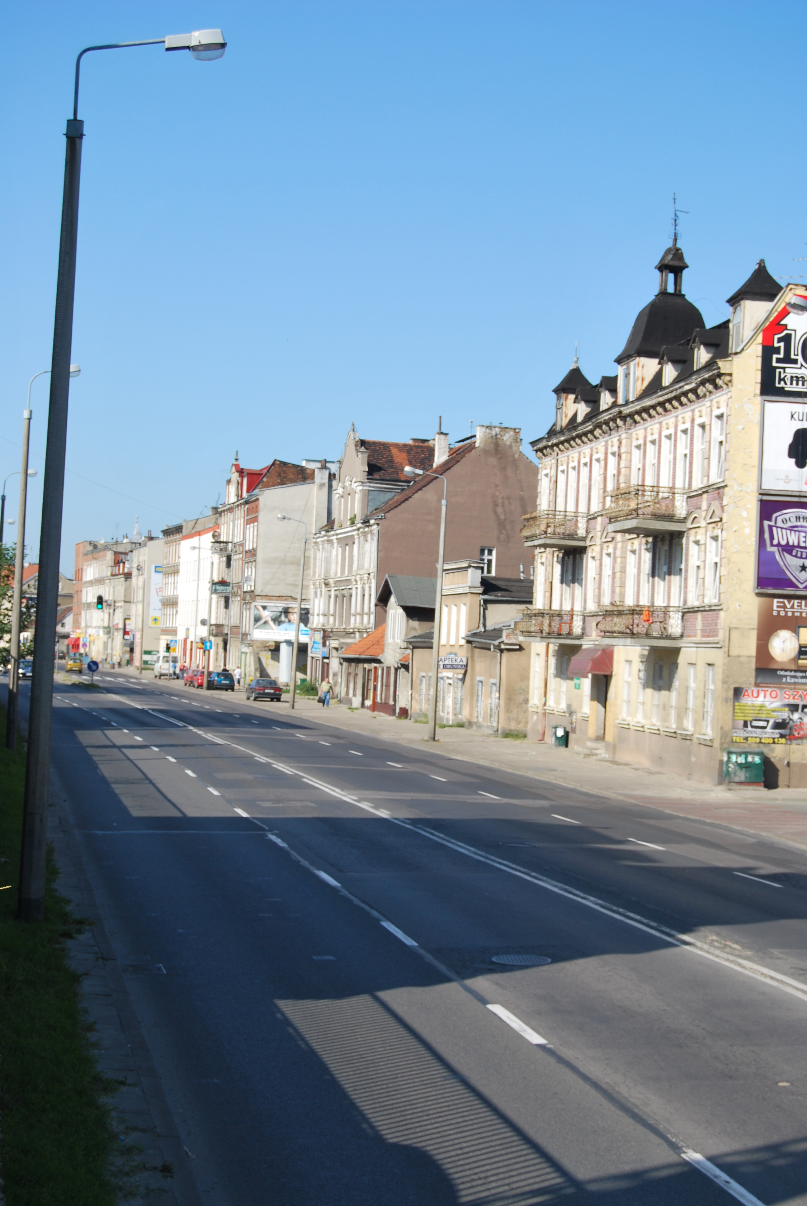 Gdańsk Orunia Trakt św. Wojciecha (2009 r.)